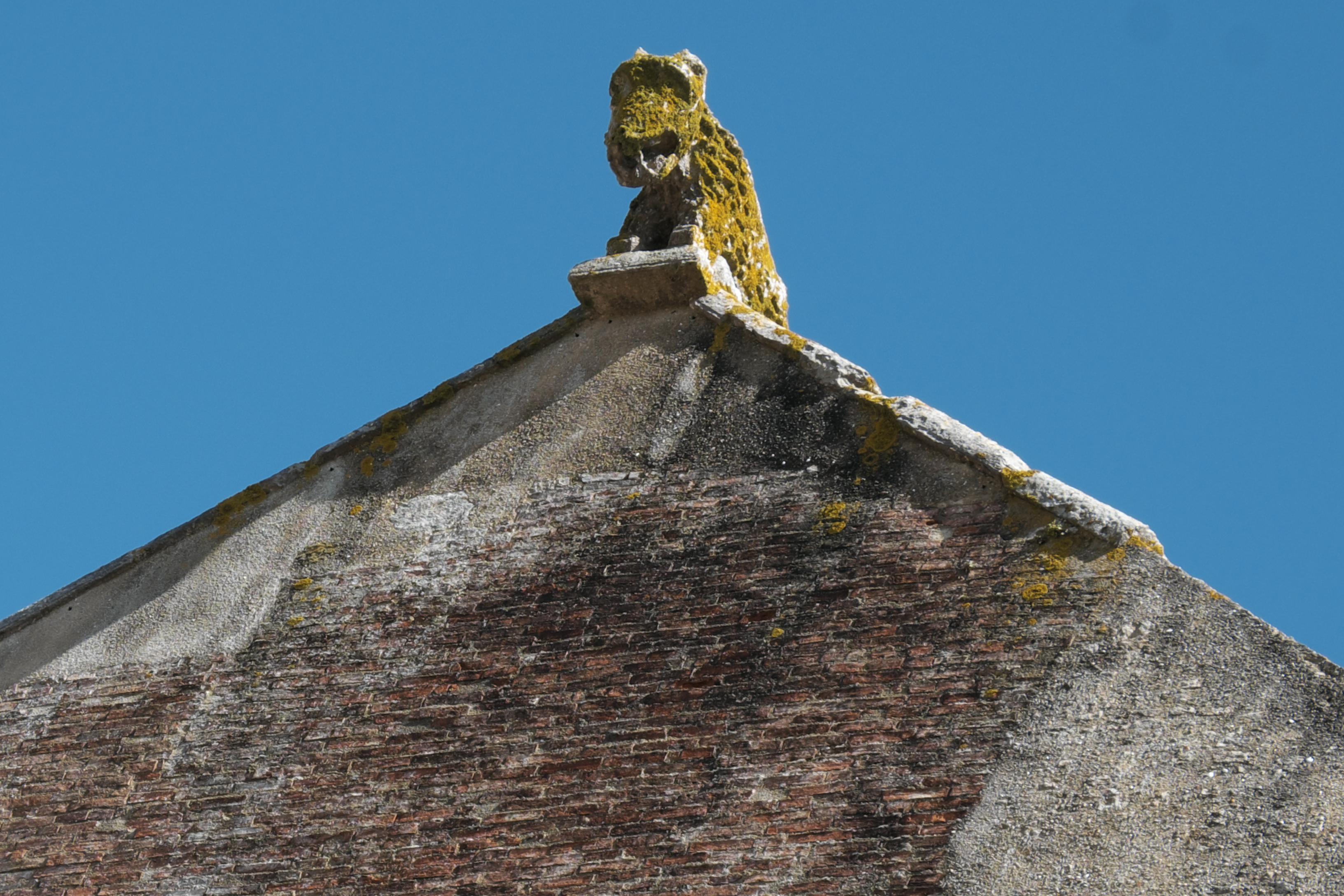 Katholische Kirche Notre-Dame-des-Anges in Angles im Département Vendée (Pays de la Loire/Frankreich), Malebête